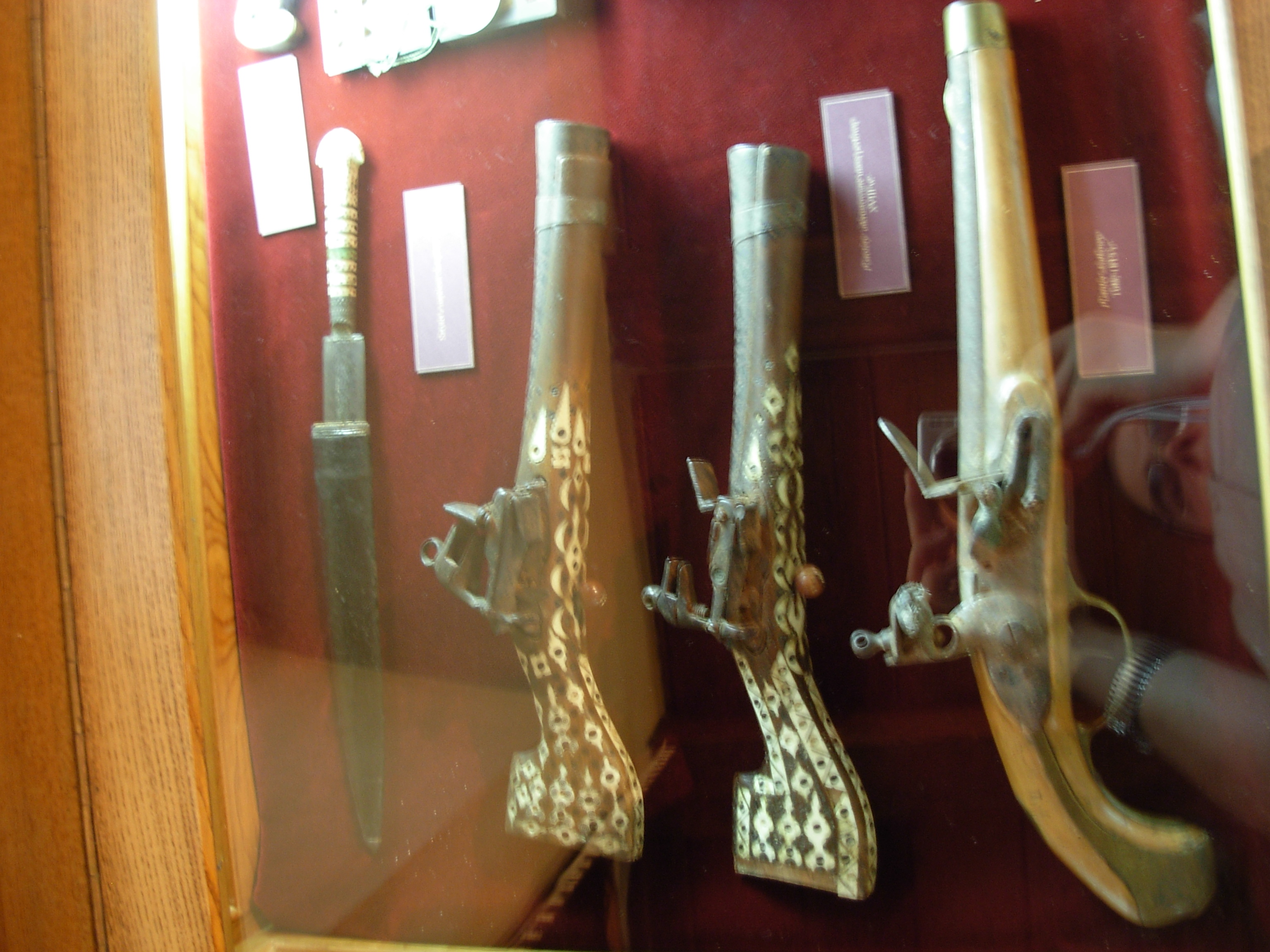 Jan Długosz House in Sandomierz Sandomierz, Poland. Diocesan museum.